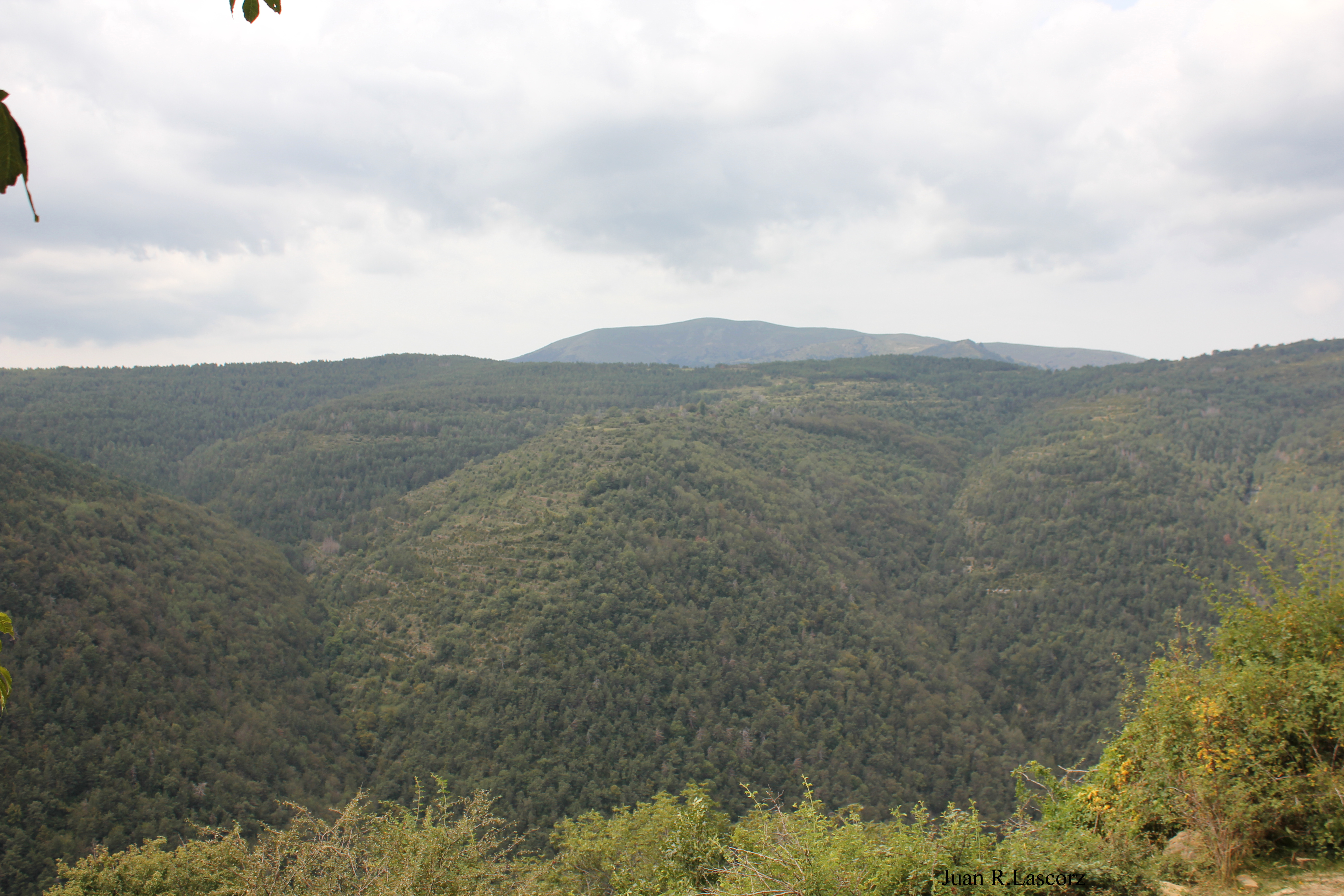 Aragonés: Basarán y dezaga d'el, la Oturía, dende Escartín.